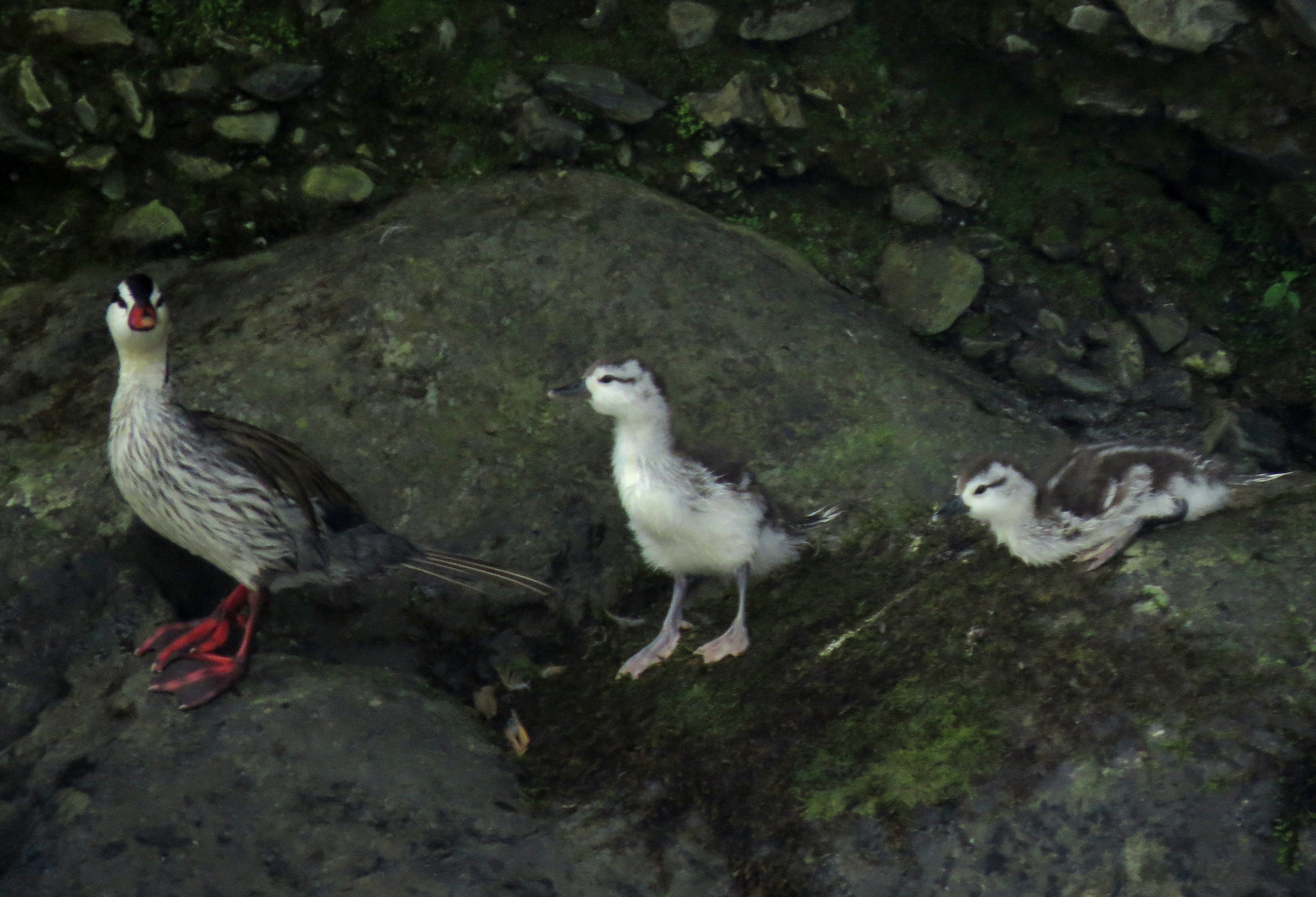 Merganetta armata (Pato de torrente)